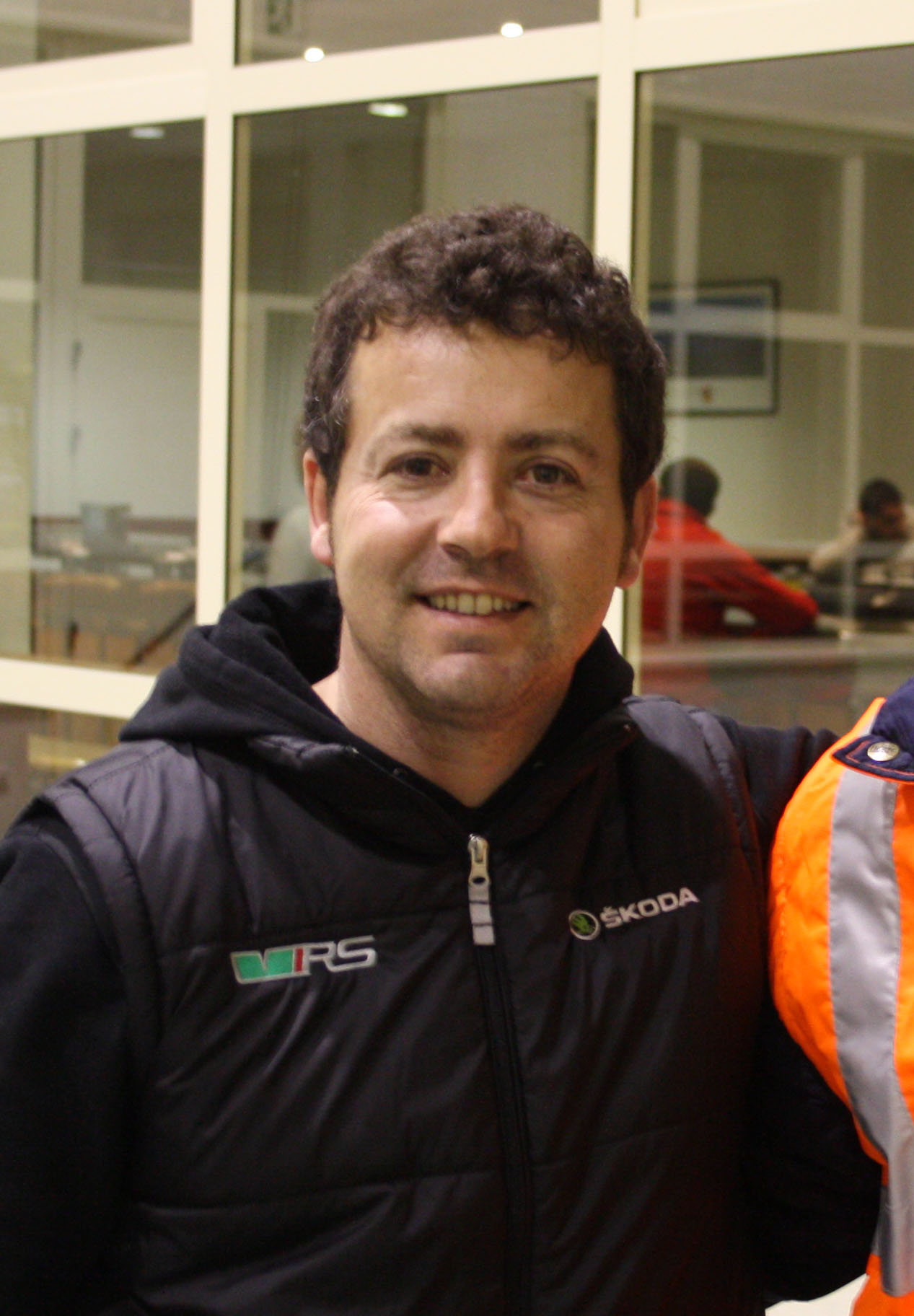 Alberto Hevia en 2012.